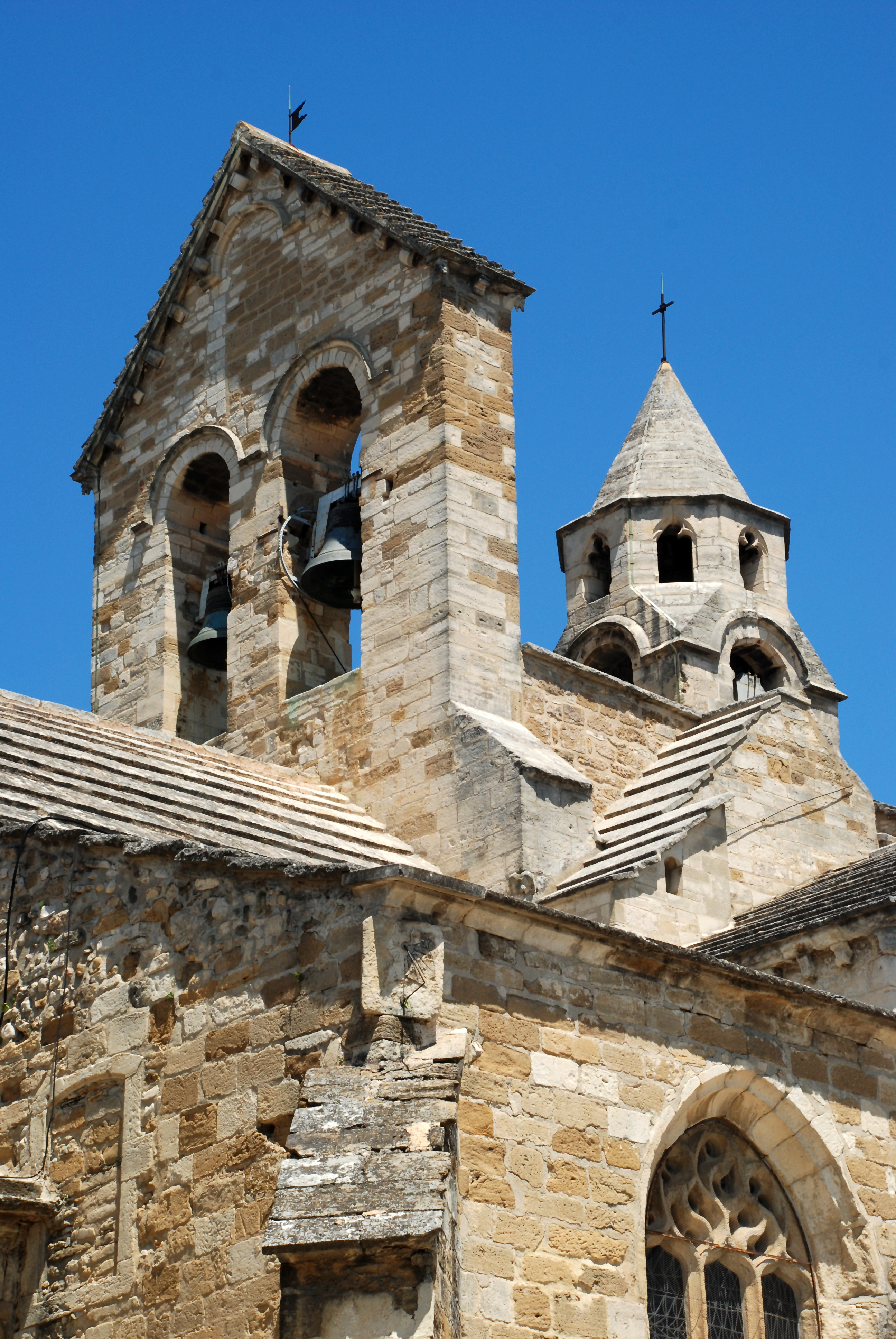 France - Provence - Église Notre-Dame-de-Nazareth de Valréas